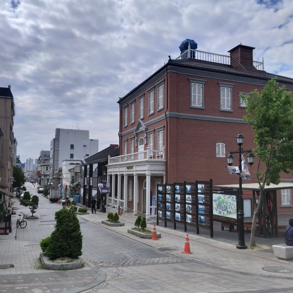 인천 차이나타운 대불호텔 앞 거리